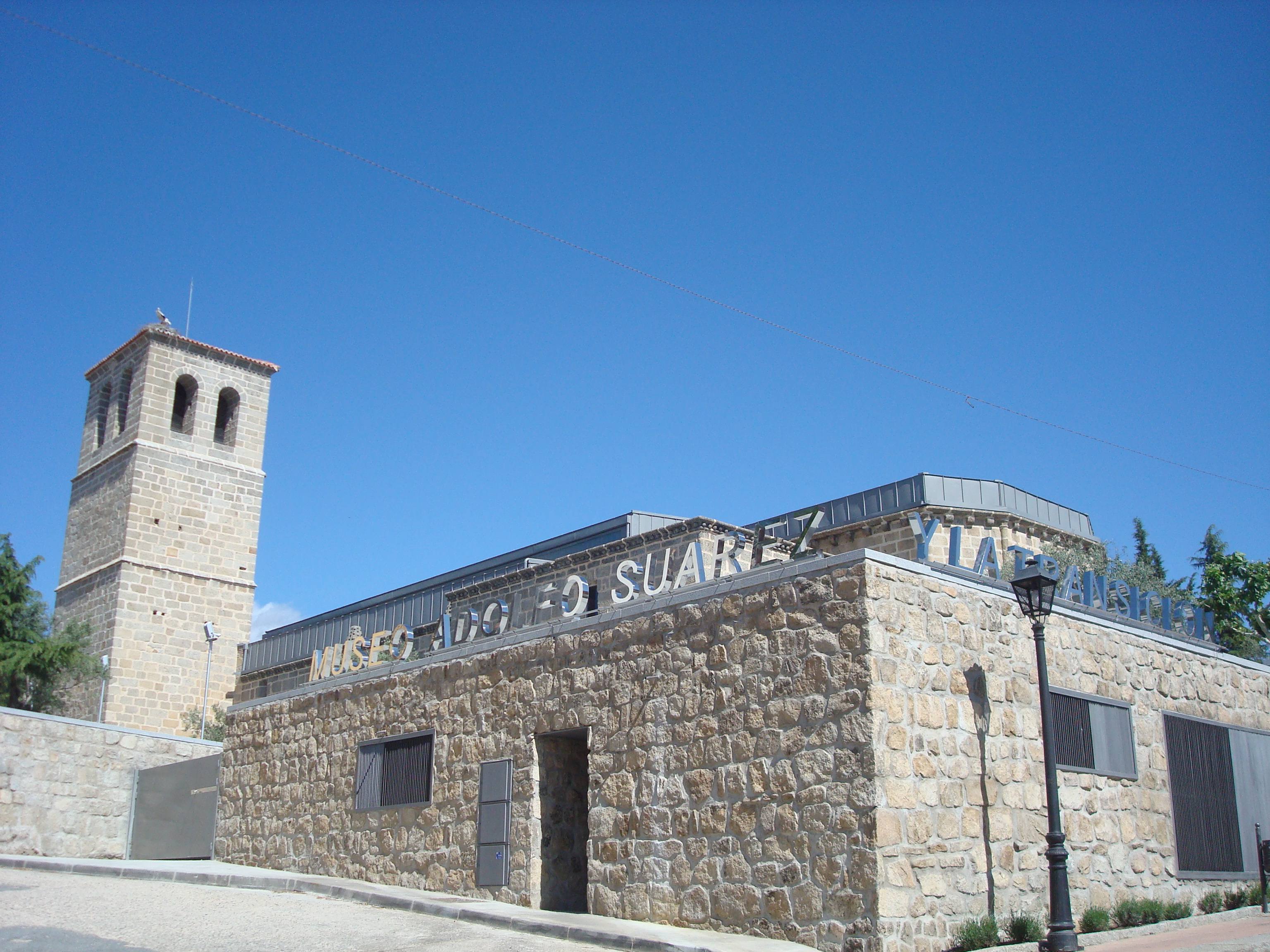 Cebreros - 006